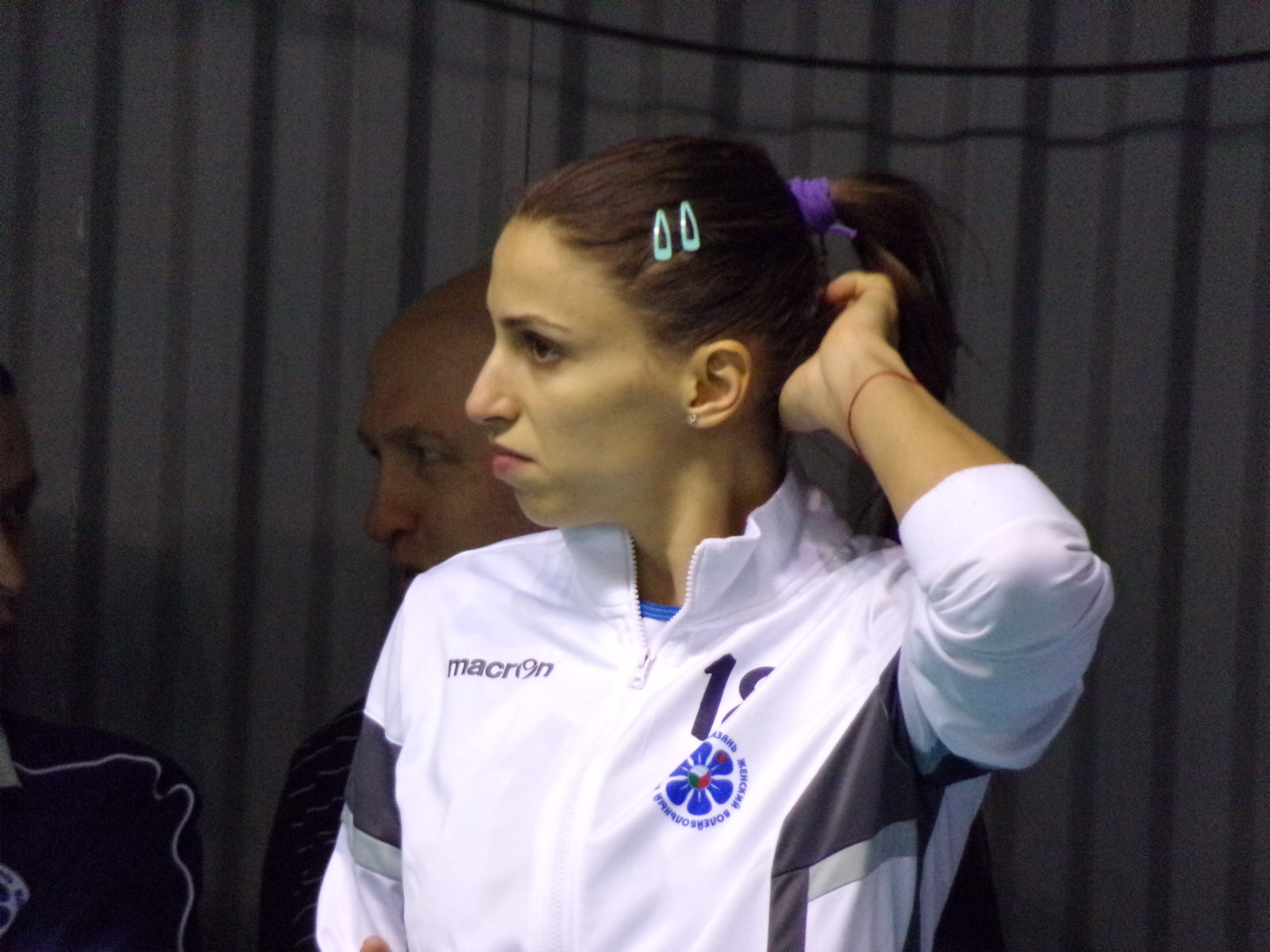 Элица Василева в составе команды "Динамо-Казань", 09.02.2018